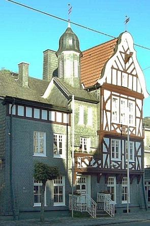 Haus im historischen Stadtkern von Schmallenberg, Germany.